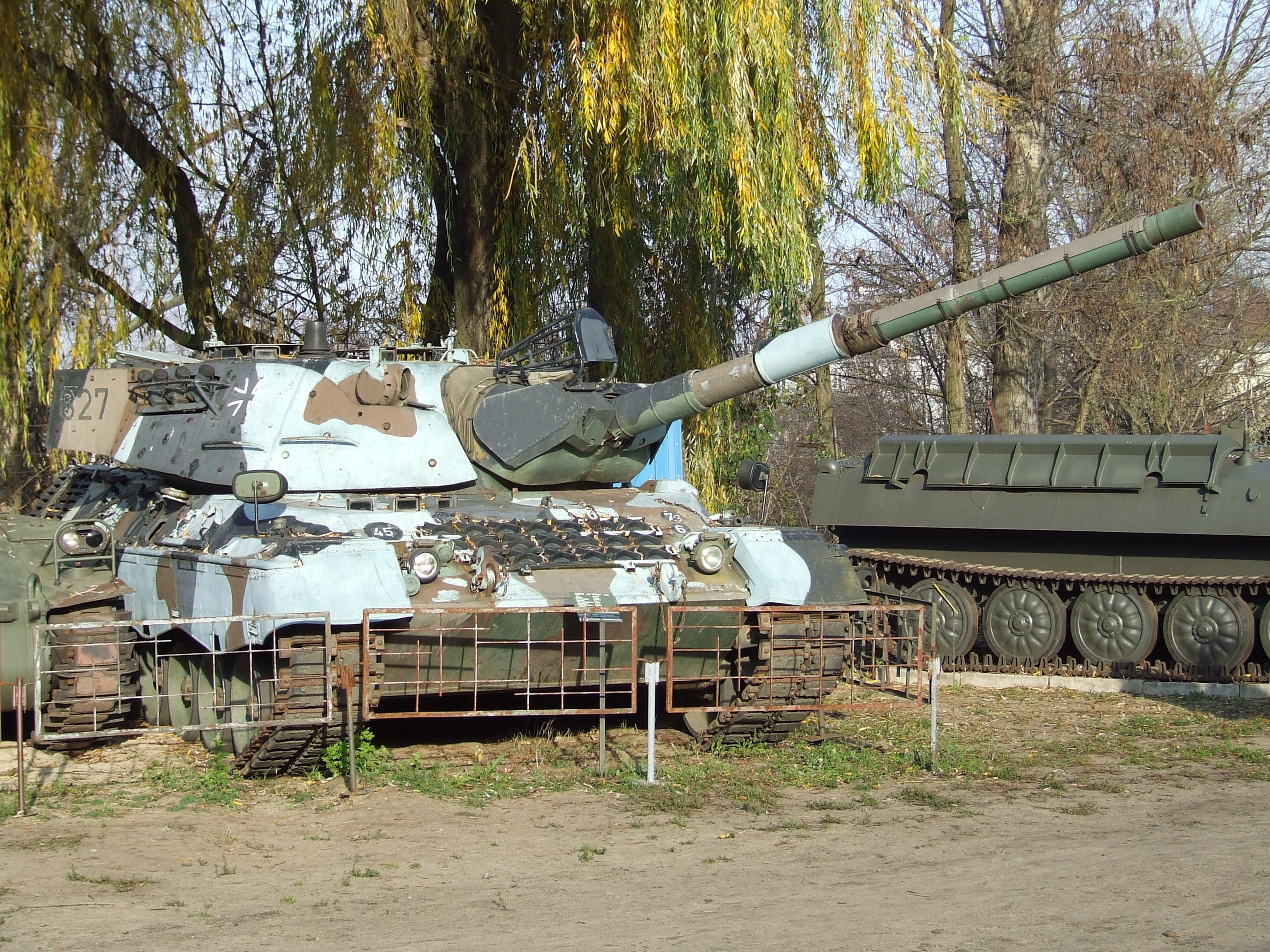 Kampfwertgesteigerter Leopard 1 aus den ersten vier Baulosen (Fahrzeugnummern 5001 bis 8970). Vermutlich ein 1A1A4, also Gußturm mit Zusatzpanzerung und PZB 200. Der Panzer verfügt ebenfalls noch über den Turmentfernungsmesser (TEM) 2A, (ab 1A4 EMES!) und Turmrundblickperiskop (TRP) 2A (ab 1A4 PERI-R12). Es ist so kein 1A4.